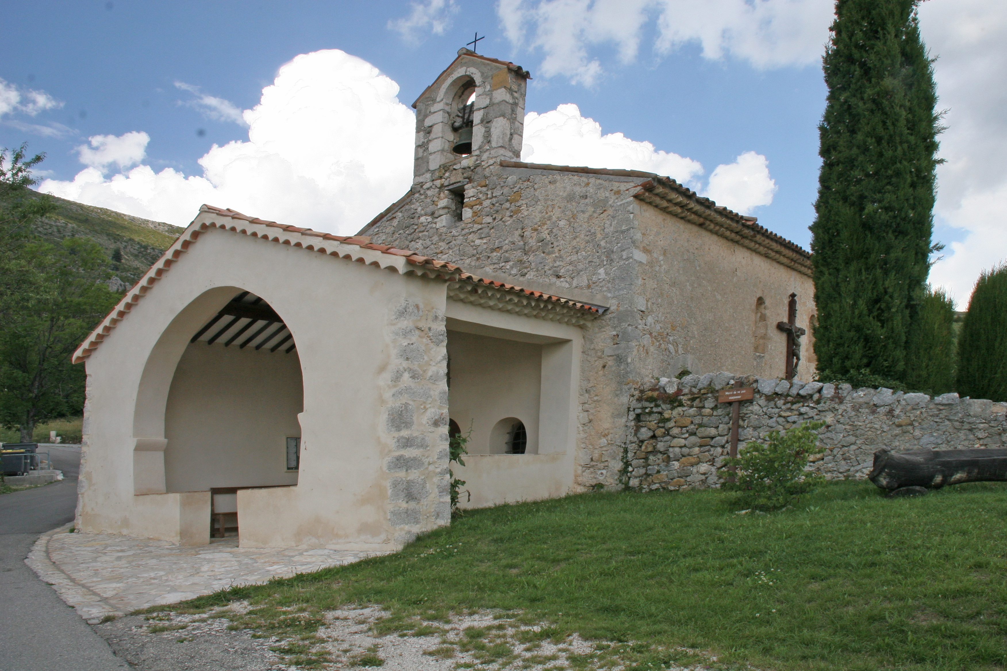 Rougon